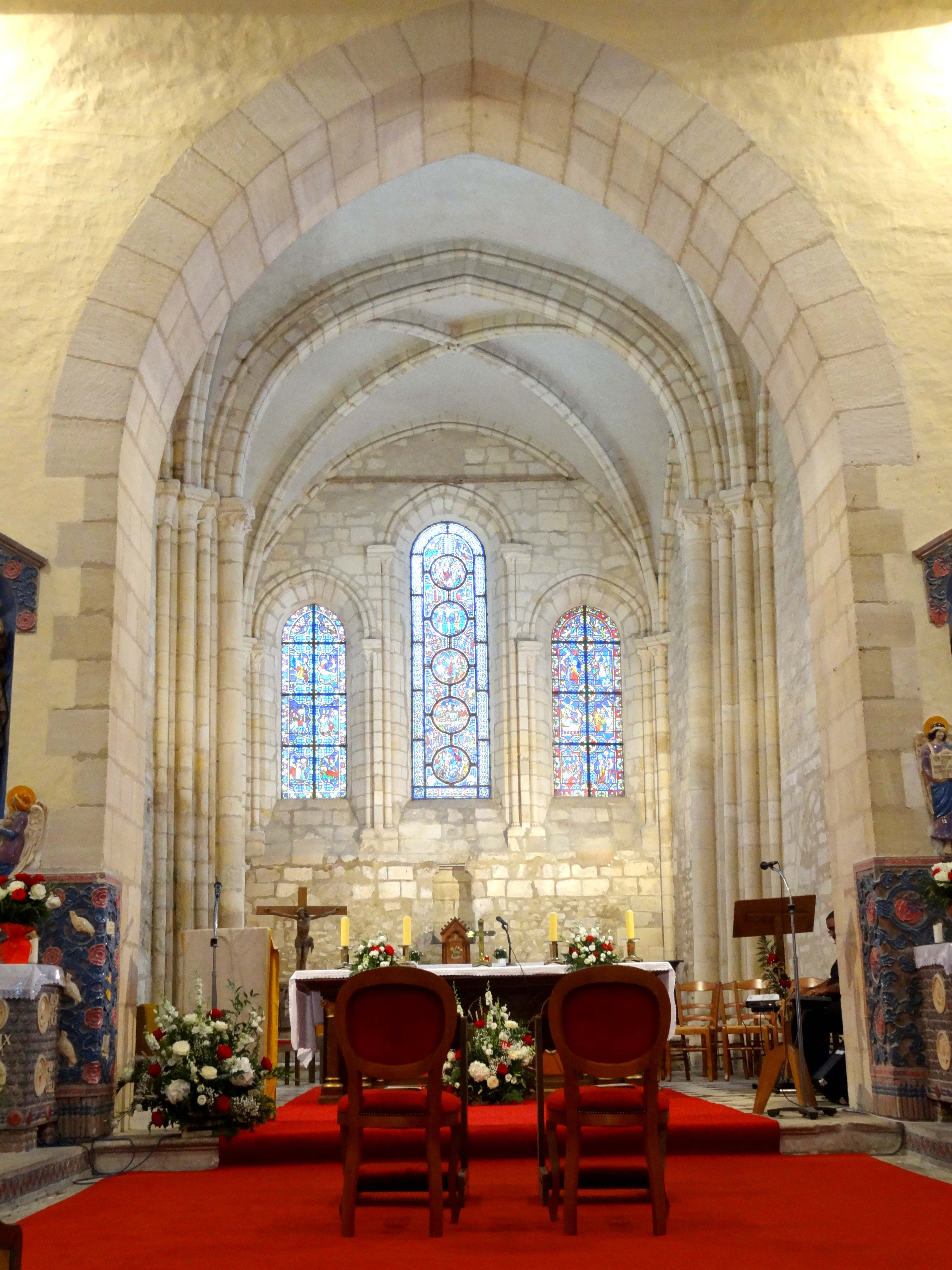 Intérieur de l'église - voir titre.